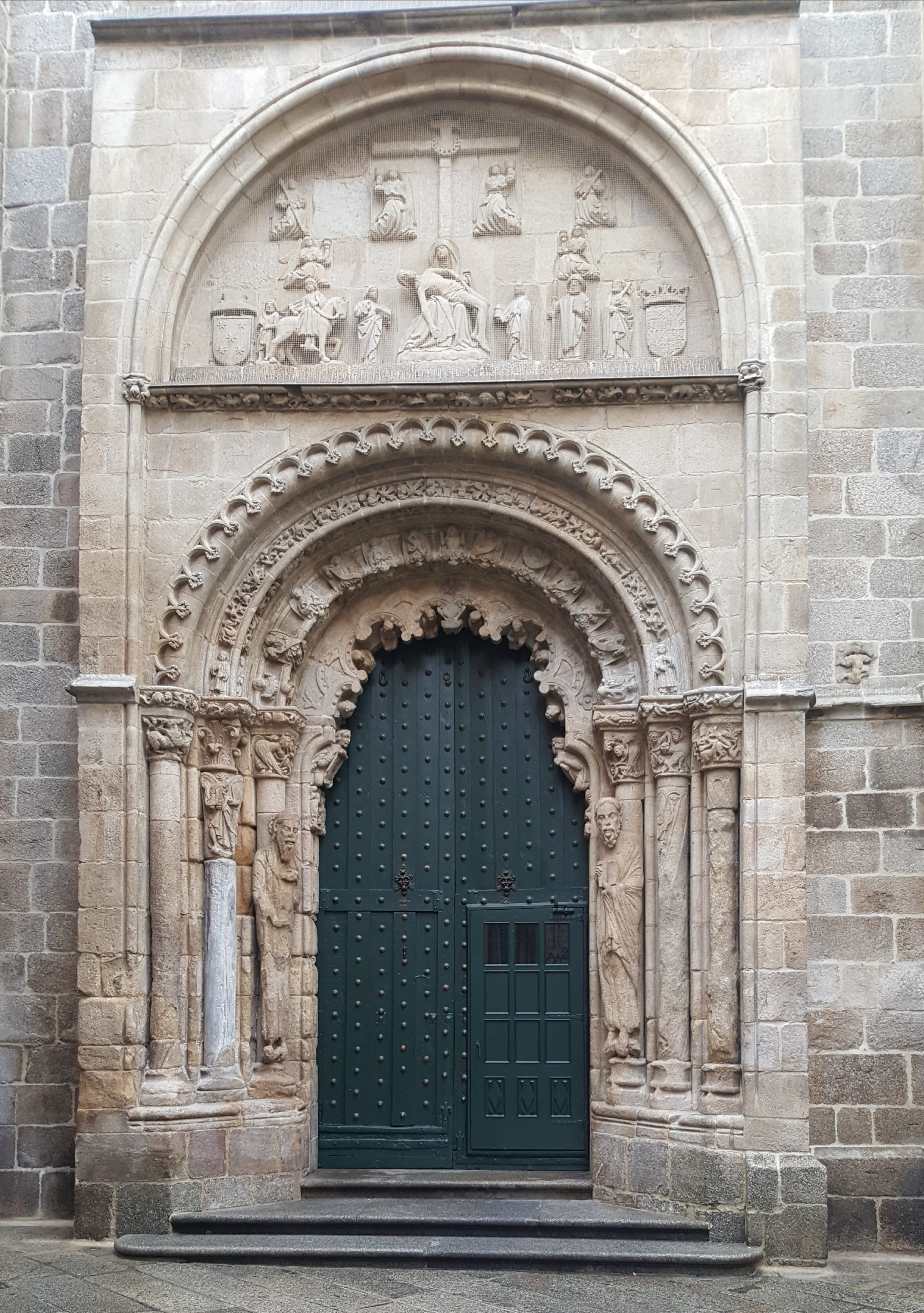 Porta Norte da Catedral de Ourense